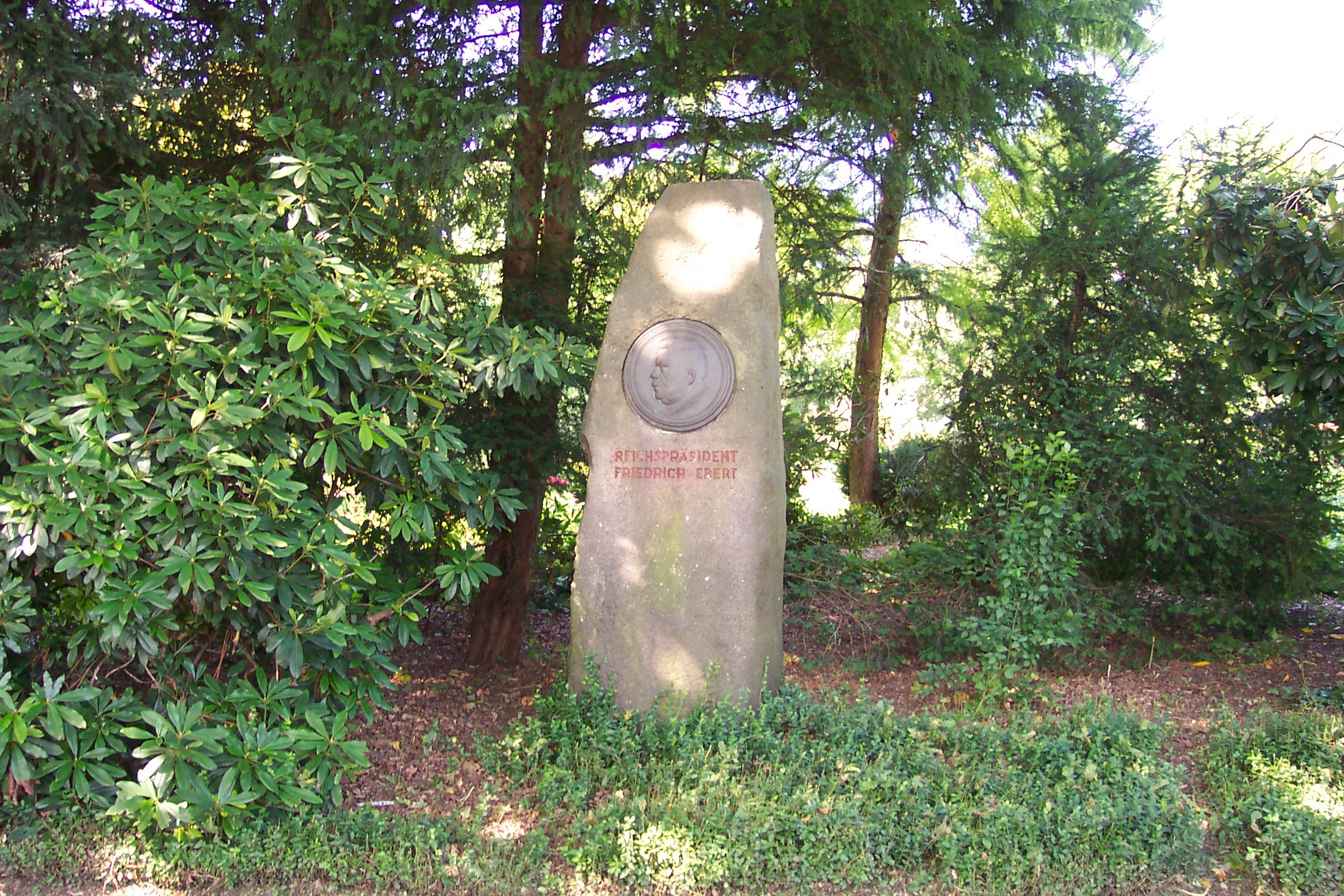 Gedenkstein zum Reichspräsidenten Friedrich Ebert auf der Hardt, Wuppertal